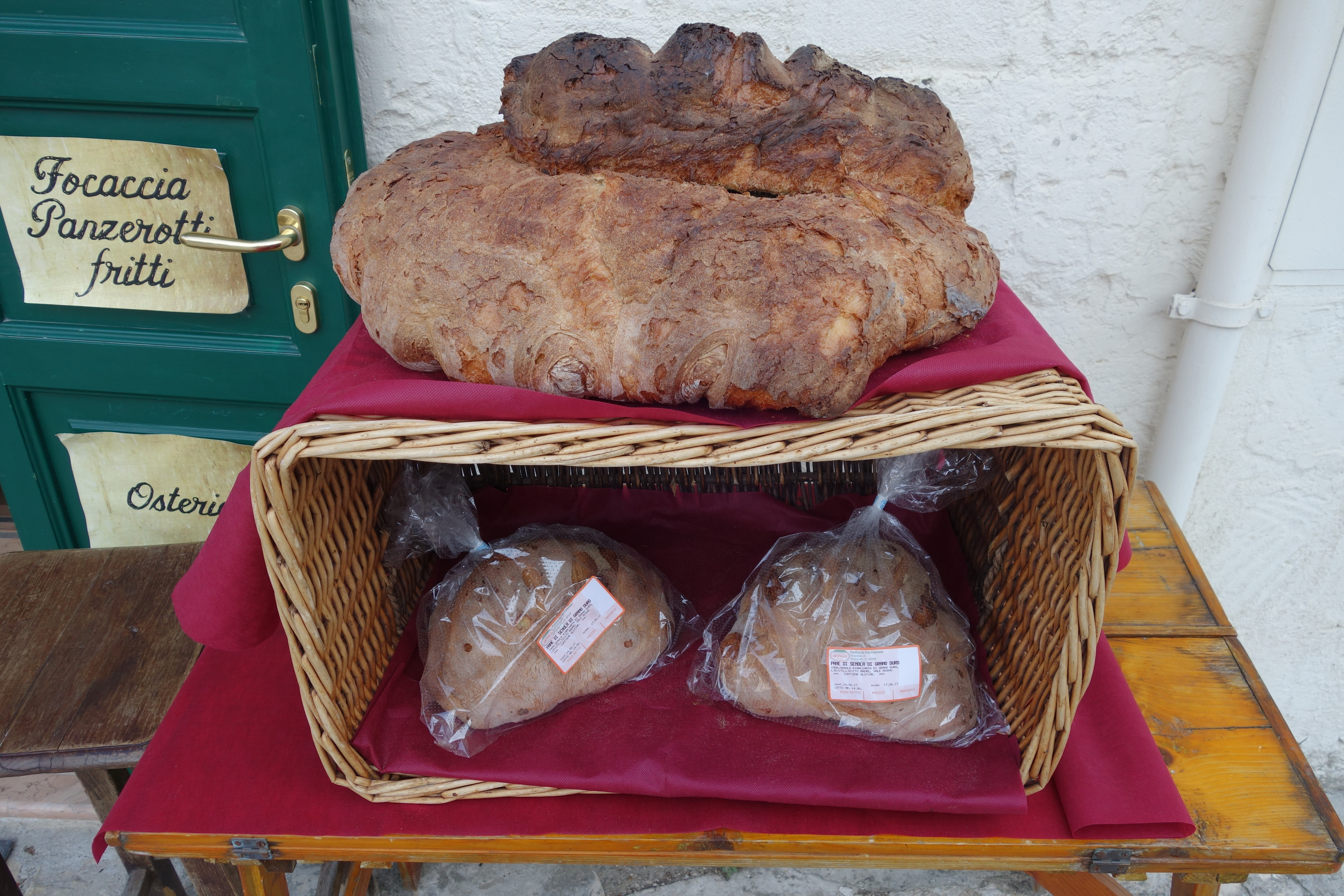 Pane di Matera